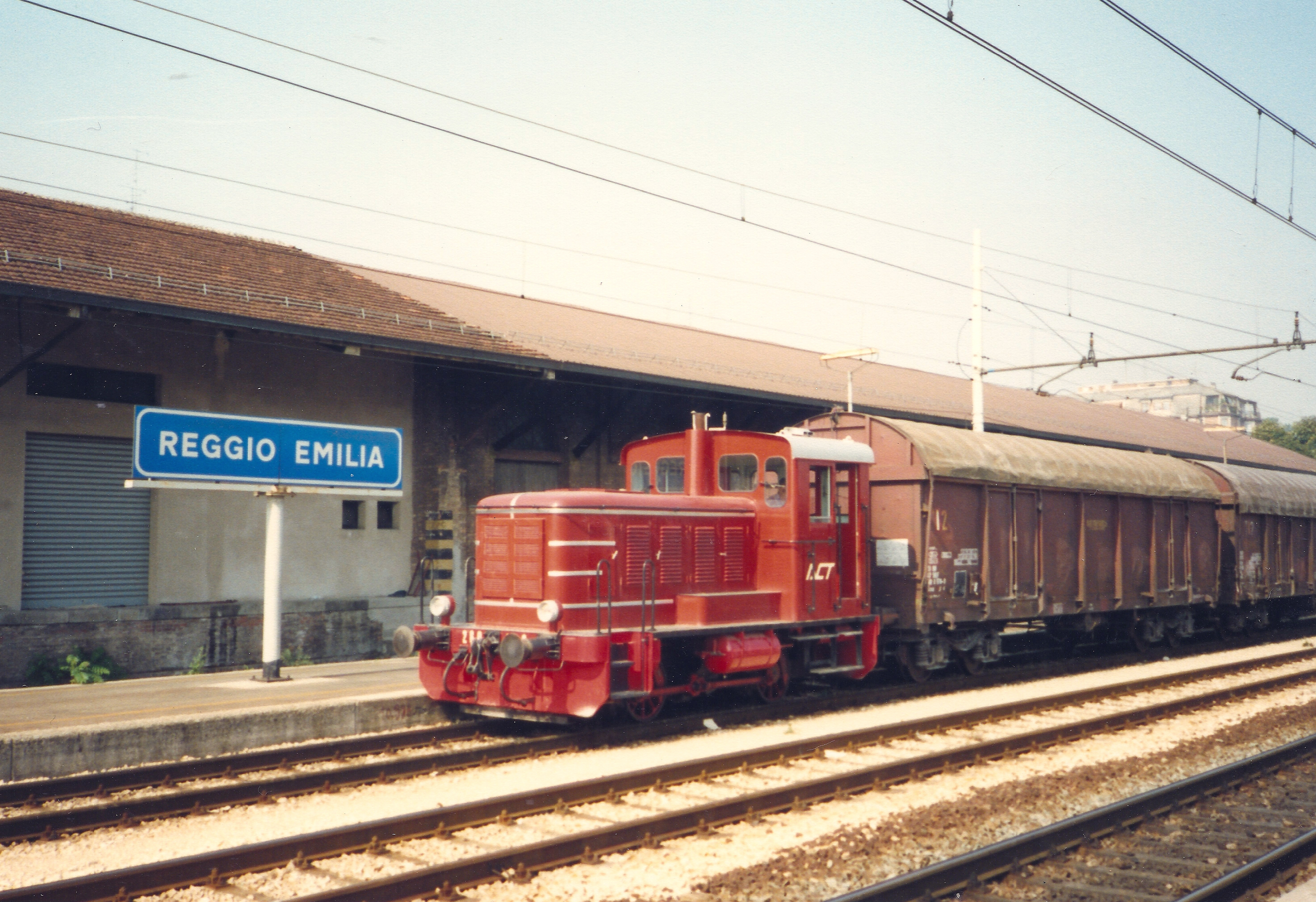 Locomotiva da manovra 260.002 dell'ACT in manovra a Reggio Emilia